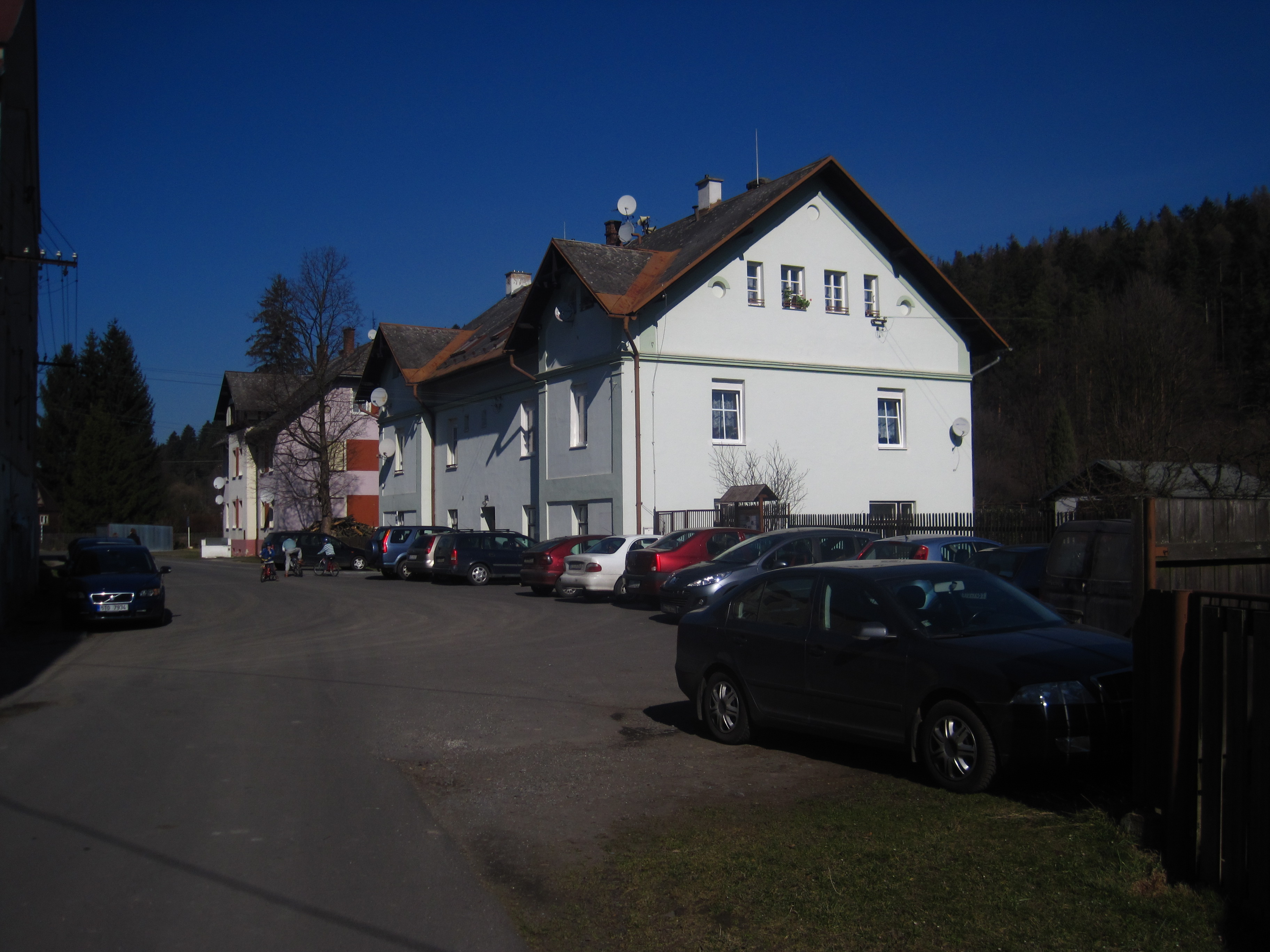 Nové Heřminovy - dělnické domy čp. 124 (blíže) a čp. 65 (v pozadí)